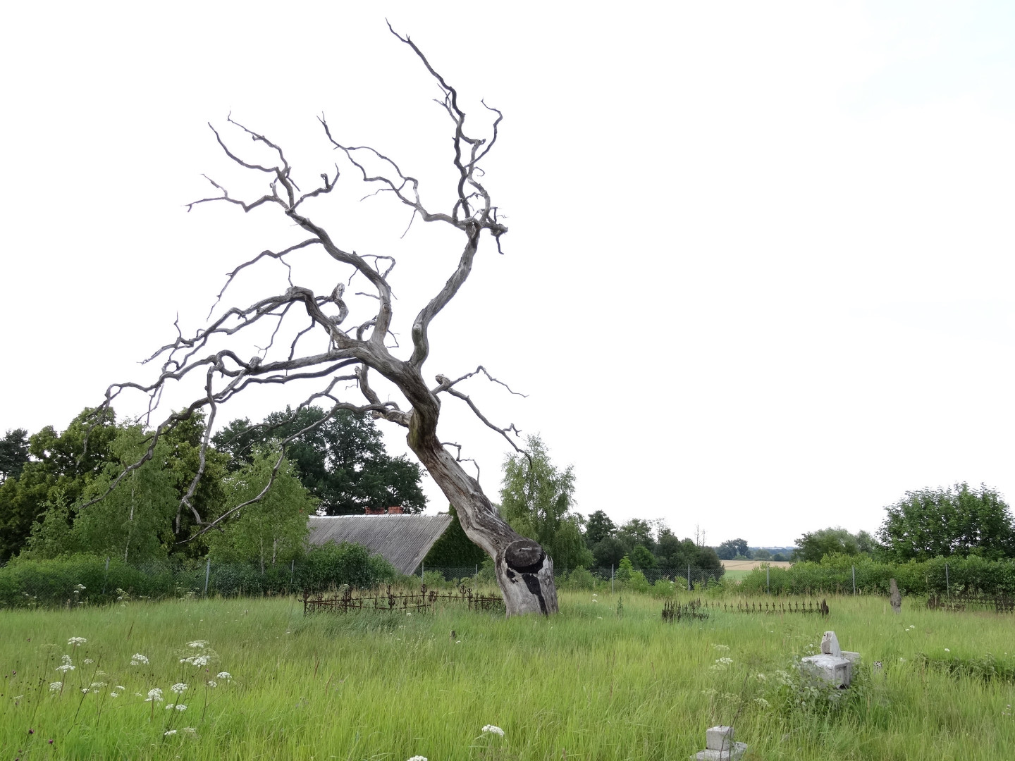 Cmentarz ewangelicko-menonicki w Przyłubiu, gmina Solec Kujawski, powiat bydgoski